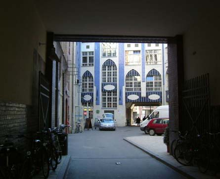 Torweg in den Hackeschen Höfen, Berlin